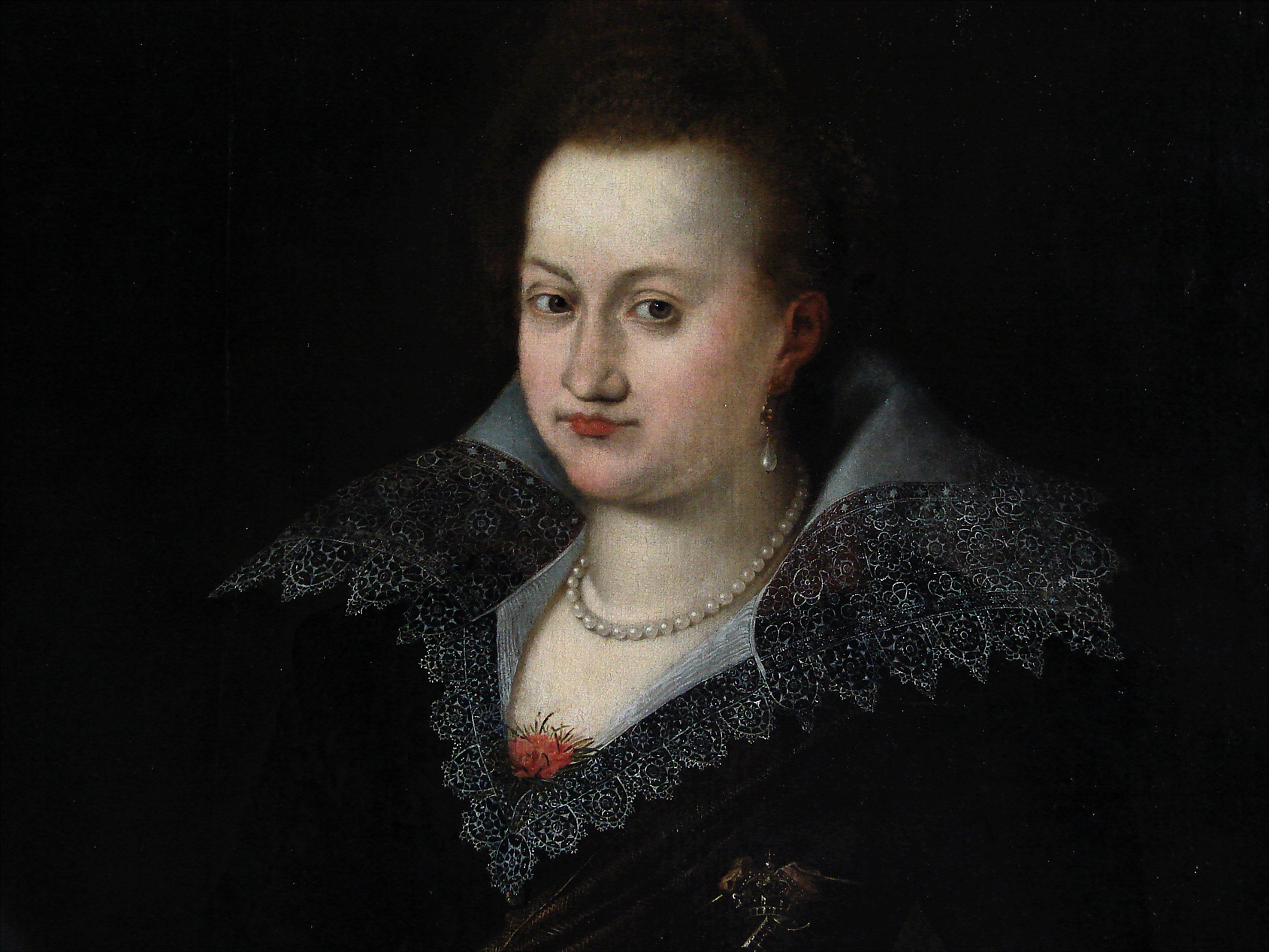 Hedevig af Sachsen (1581- 1641), prinsesse af Danmark og Norge (datter af Frederik II og Sophie af Mecklenburg), Frederiksborg Slot